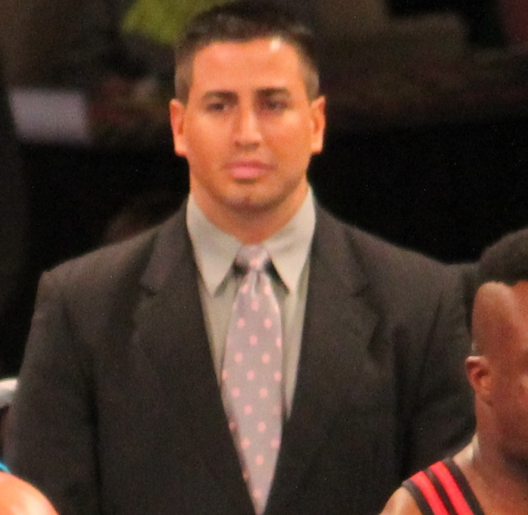 Ausgeschnittenes Bild von Justin Roberts